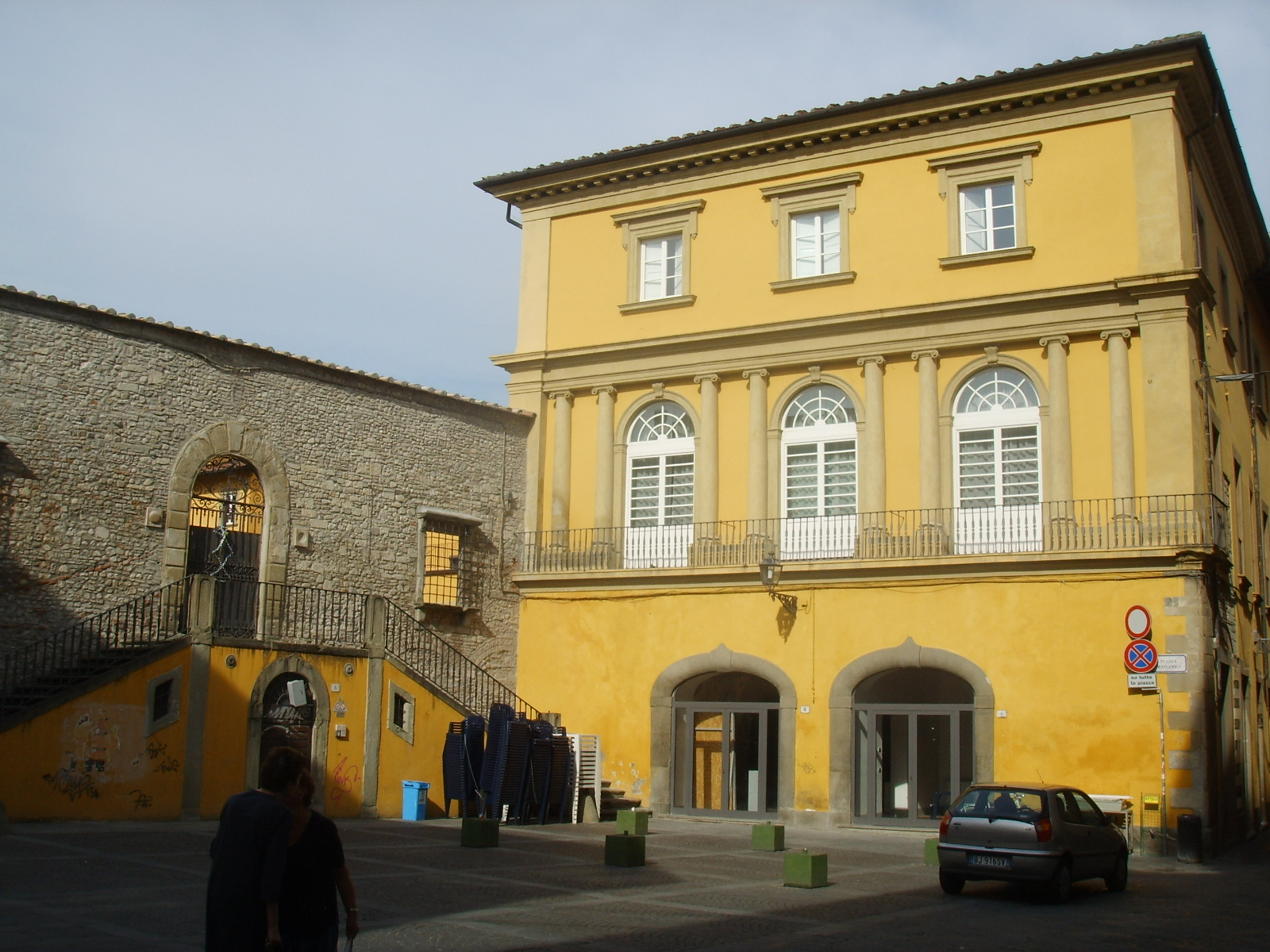 Piazza buonamici e palazzo vai, prato